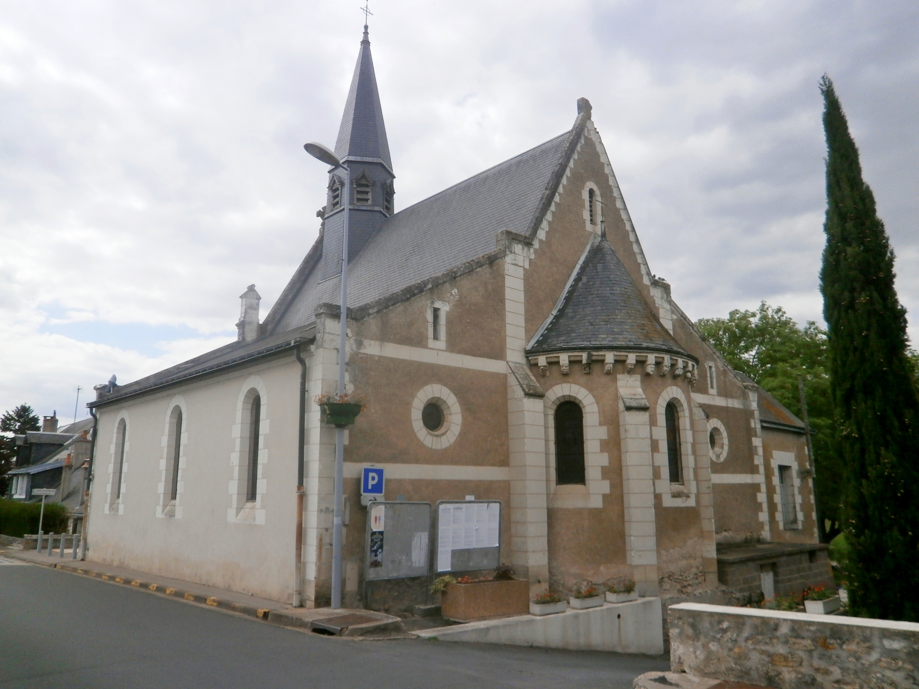 L'église de Saint-Genouph